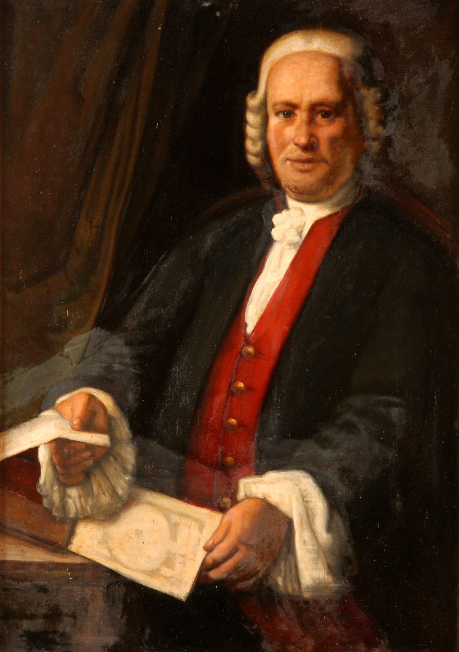 Retrato del cirujano mayor español Pedro Virgili (1699-1776), marqués de la Salud. Inspirado en el que se exhibe en la Galería de Catalanes Ilustres del Ayuntamiento de Barcelona obra de Francisco Galofré Oller.